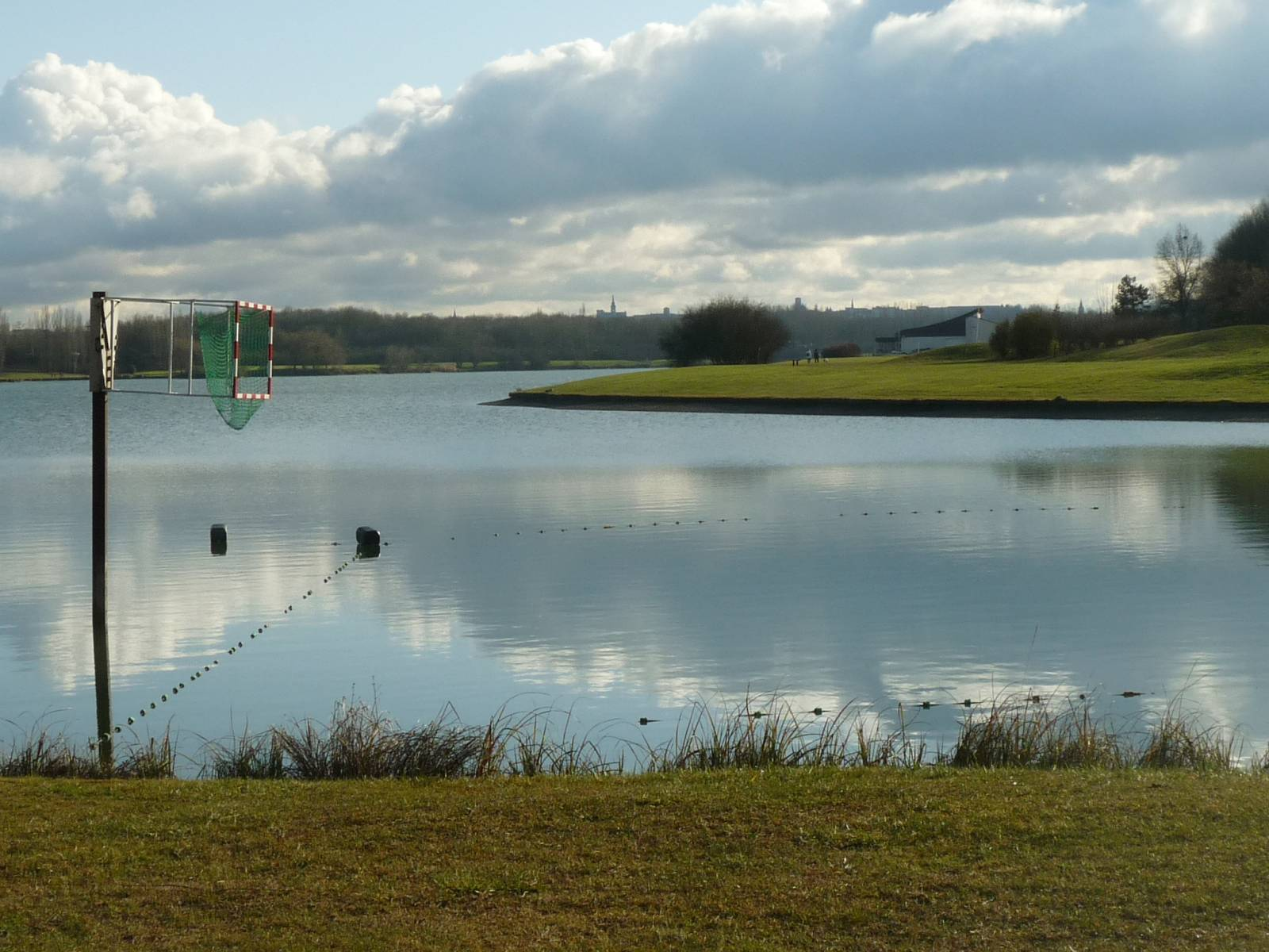 plan d'eau de la Grande Prairie à St-Yrieix (16), France